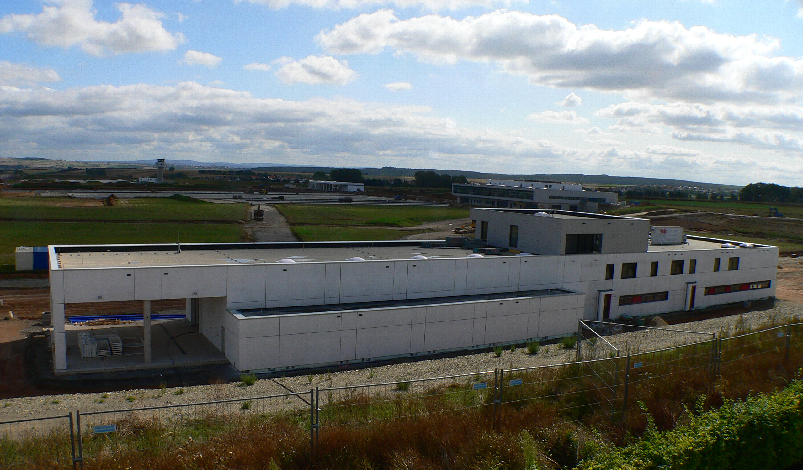 Flugplatz Kassel-Calden, Feuerwache des neuen Regionalflughafens in Bau.